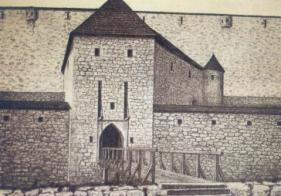 Posttürl